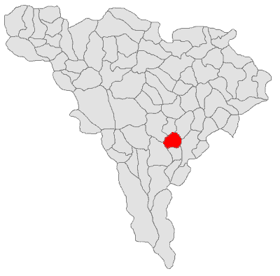 Categorie:Hărţi ale judeţului Alba